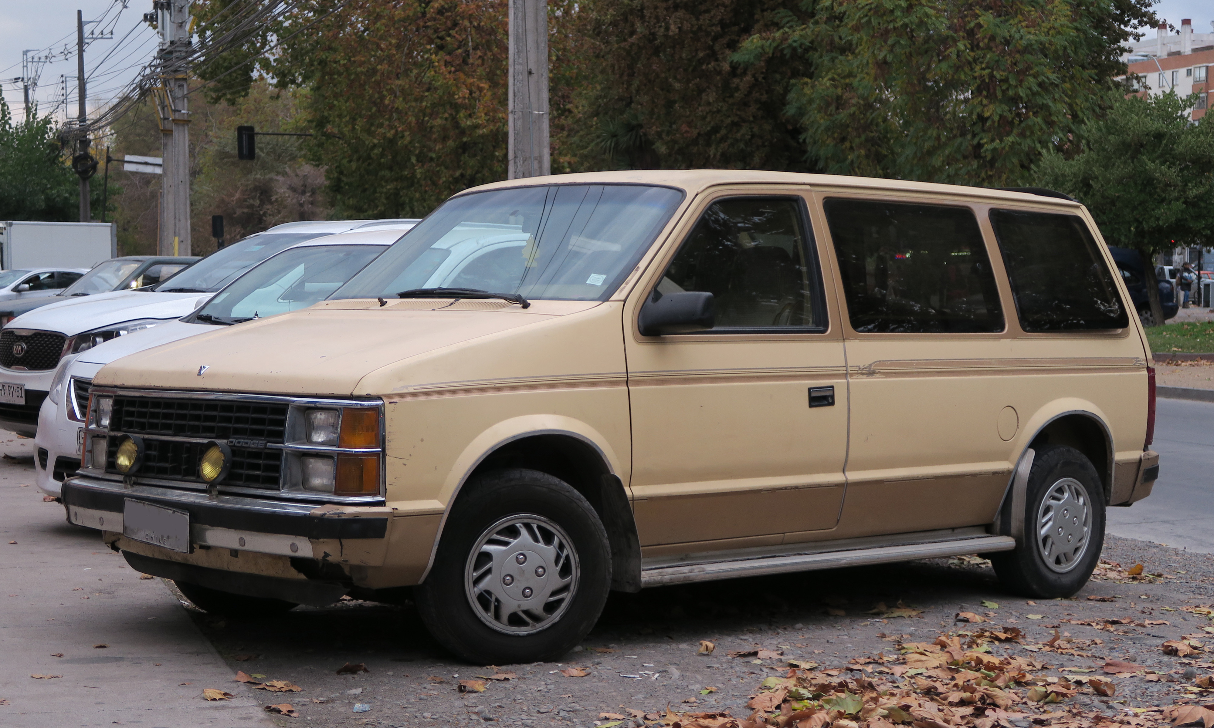 Dodge Caravan 1985